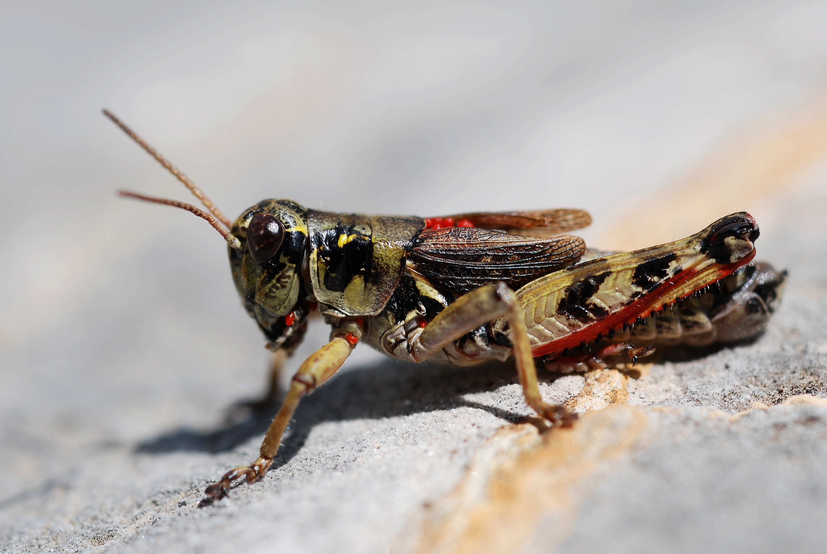 Melanopus frigidus male